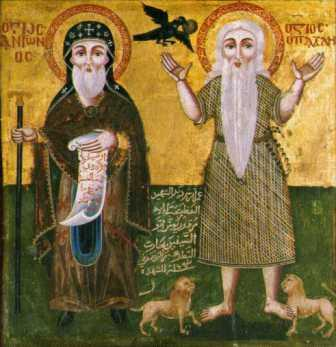 Icône copte : Saint Antoine Le Grand et St Paul ermite dans le désert